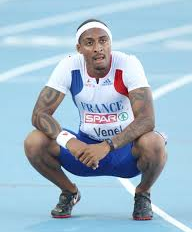 Teddy